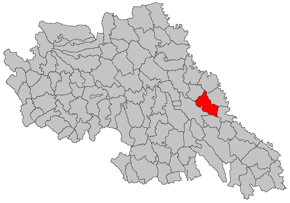 Categorie:Hărţi ale judeţului Iaşi